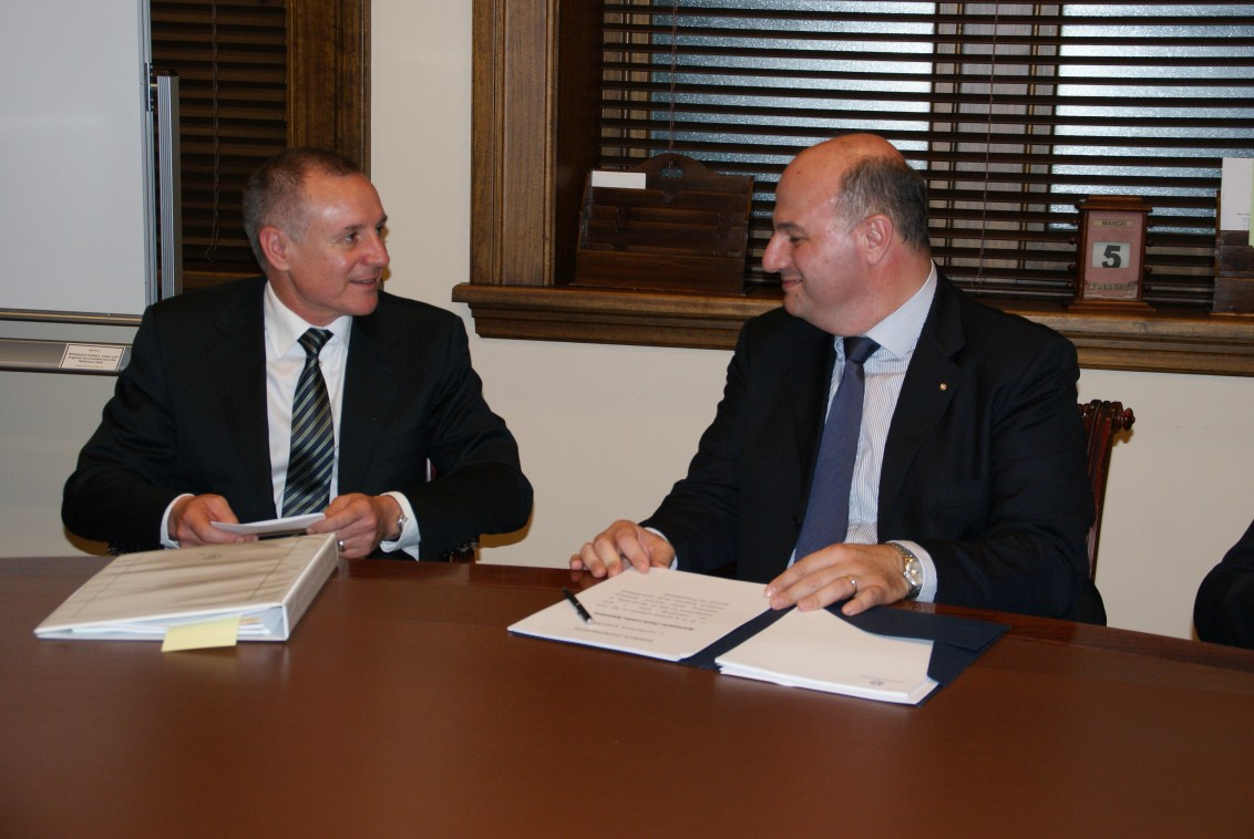 Premier of South Australia Jay Weatherill and Deputy Foreign Minister of Greece Konstantinos Tsiaras meet in Australia during 2013. Συνάντηση ΥΦΥΠΕΞ Κ. Τσιάρα με τον Πρωθυπουργό Νοτίου Αυστραλίας, Jay Weatherill στο πλαίσιο της επίσκεψής του σε Αδελαΐδα και Βρισβάνη